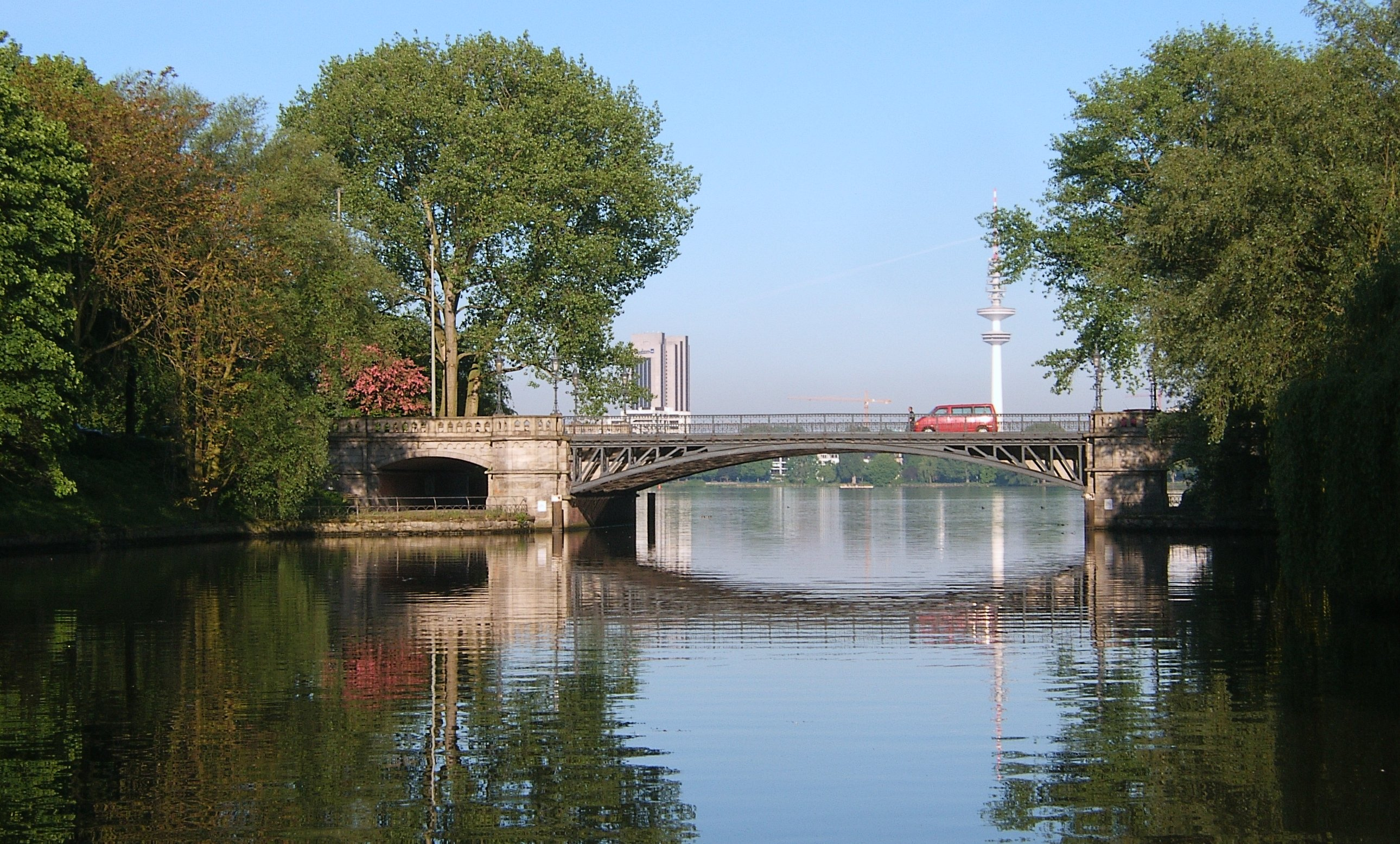 Schwanenwikbrücke in Hamburg-Hohenfelde. In Blickrichtung die Außenalster, im Hintergrund das Radisson SAS Hotel und der Heinrich-Hertz-Turm.